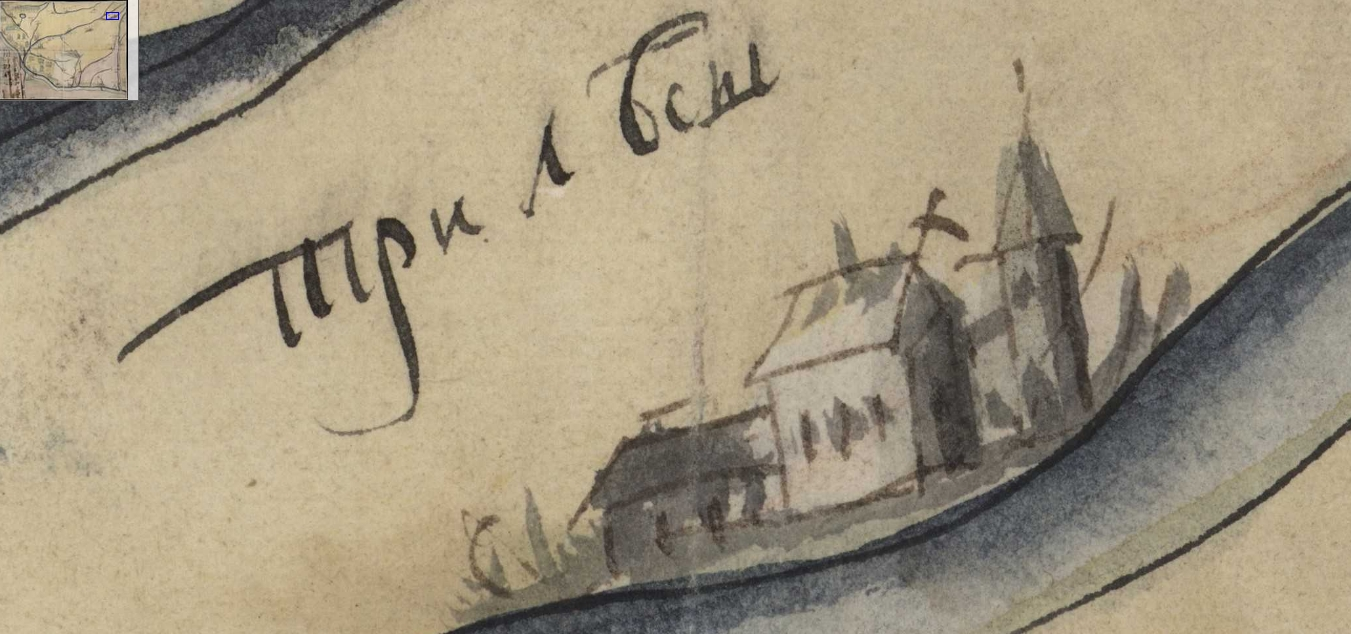 Фрагмент карти Київської губернії. XVIII століття. РГАДА, ф. 192, оп. 1, Киевская губ., № 5.